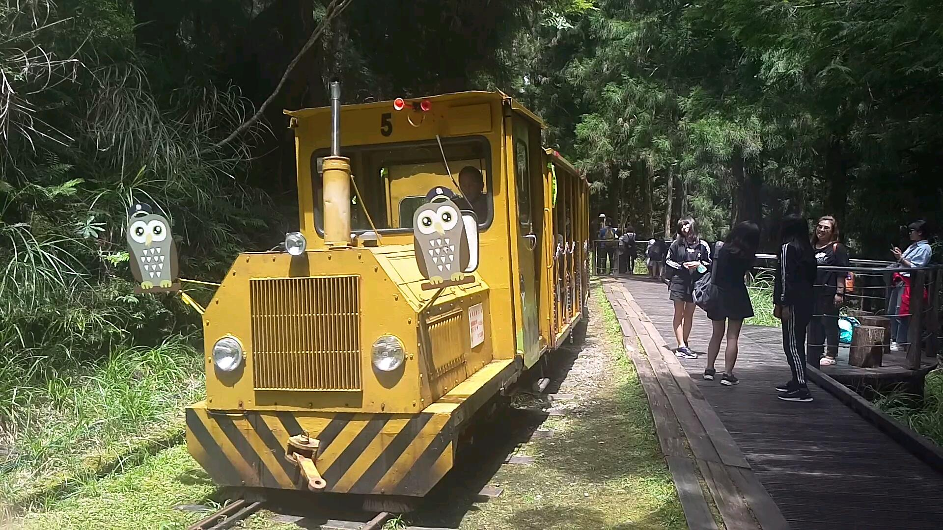 攝於茂興站